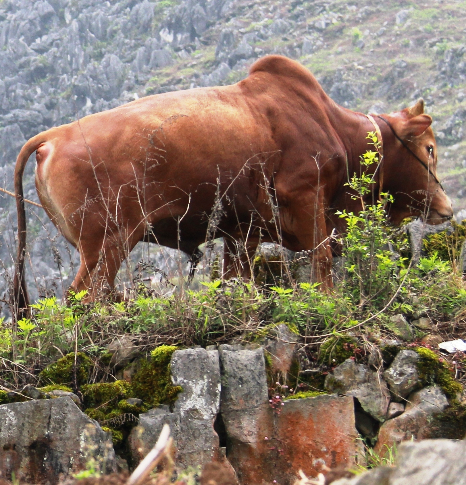 Một con bò Mèo tại vùng rừng núi miền Đông Bắc Việt Nam. Ảnh chụp bằng máy cá nhân, đã qua chỉnh sữa, cắt cho gọn